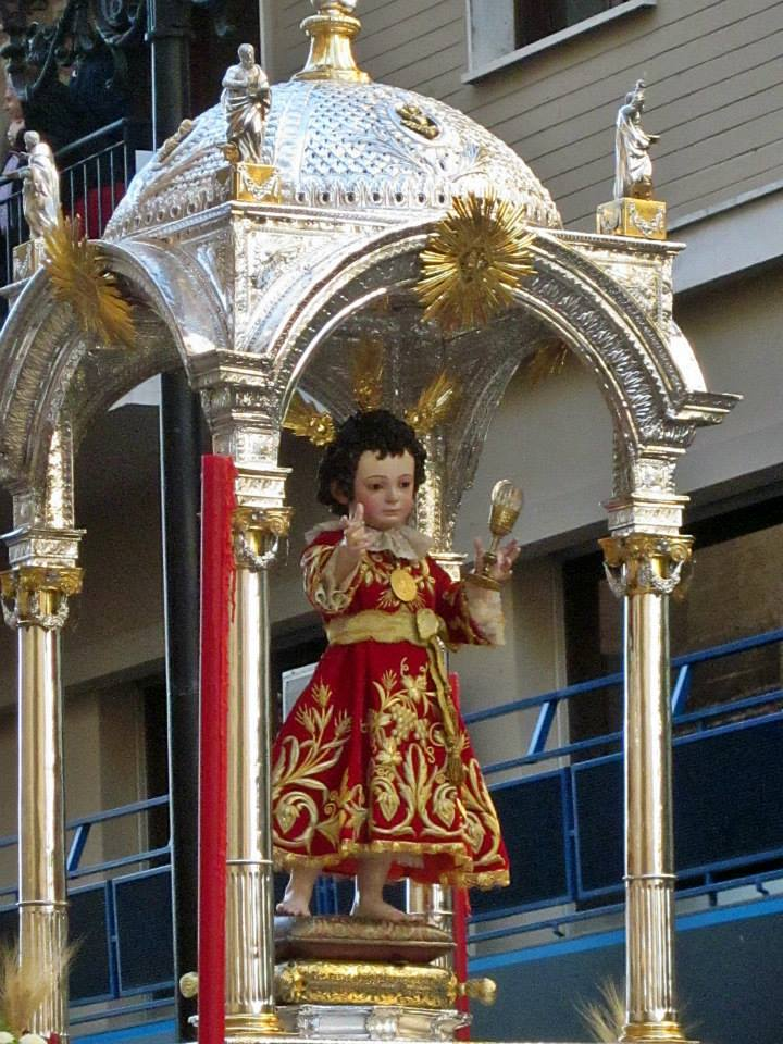 Niño Jesús Sagrario